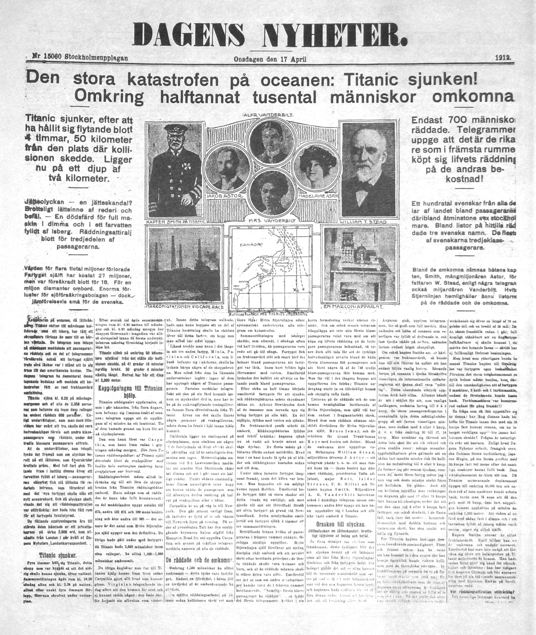 Dagens Nyheter första sida 17 april 1912 (Titanics förlisning)